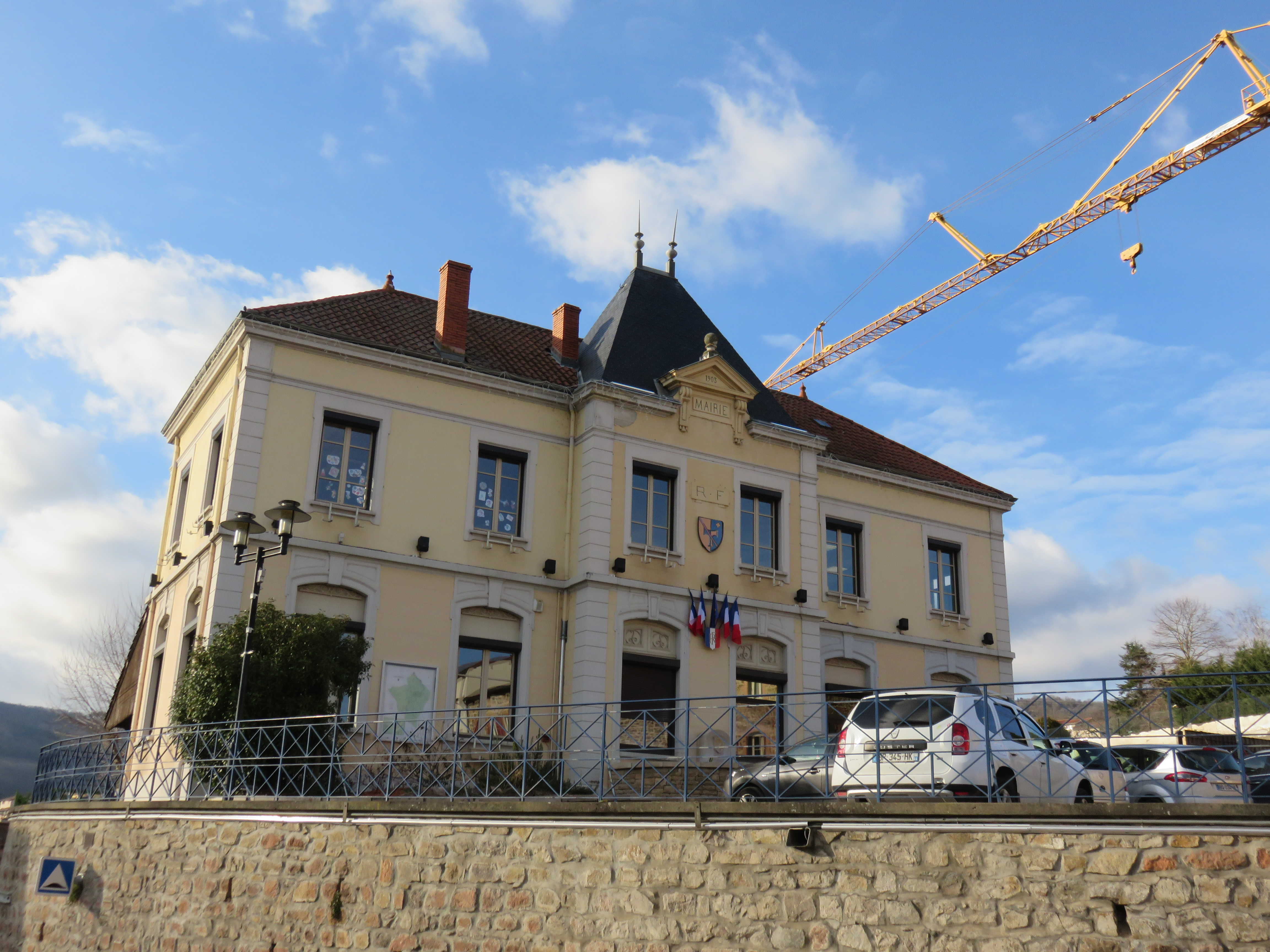 Vue de la mairie de Saint-Forgeux (Rhône, France).